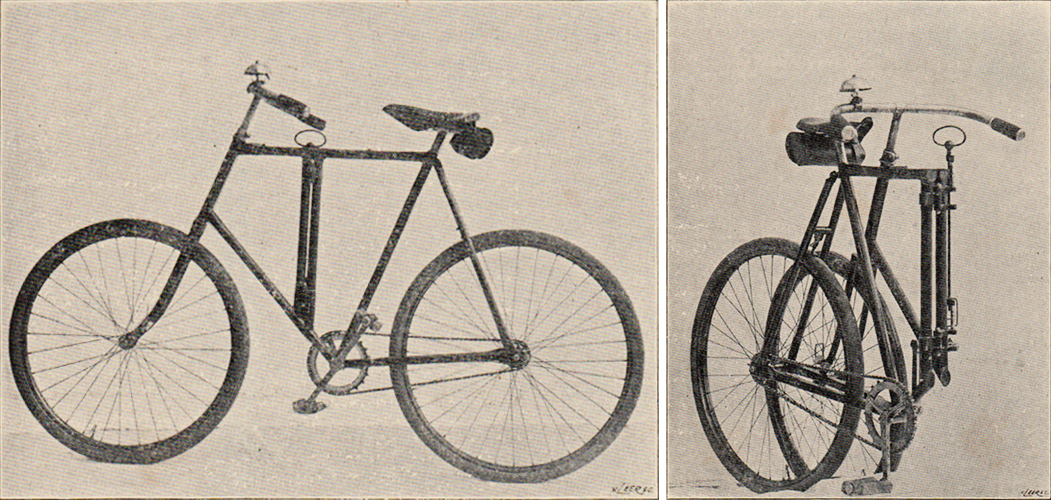 Klapprad nach Wagtendonk, ca. 1910